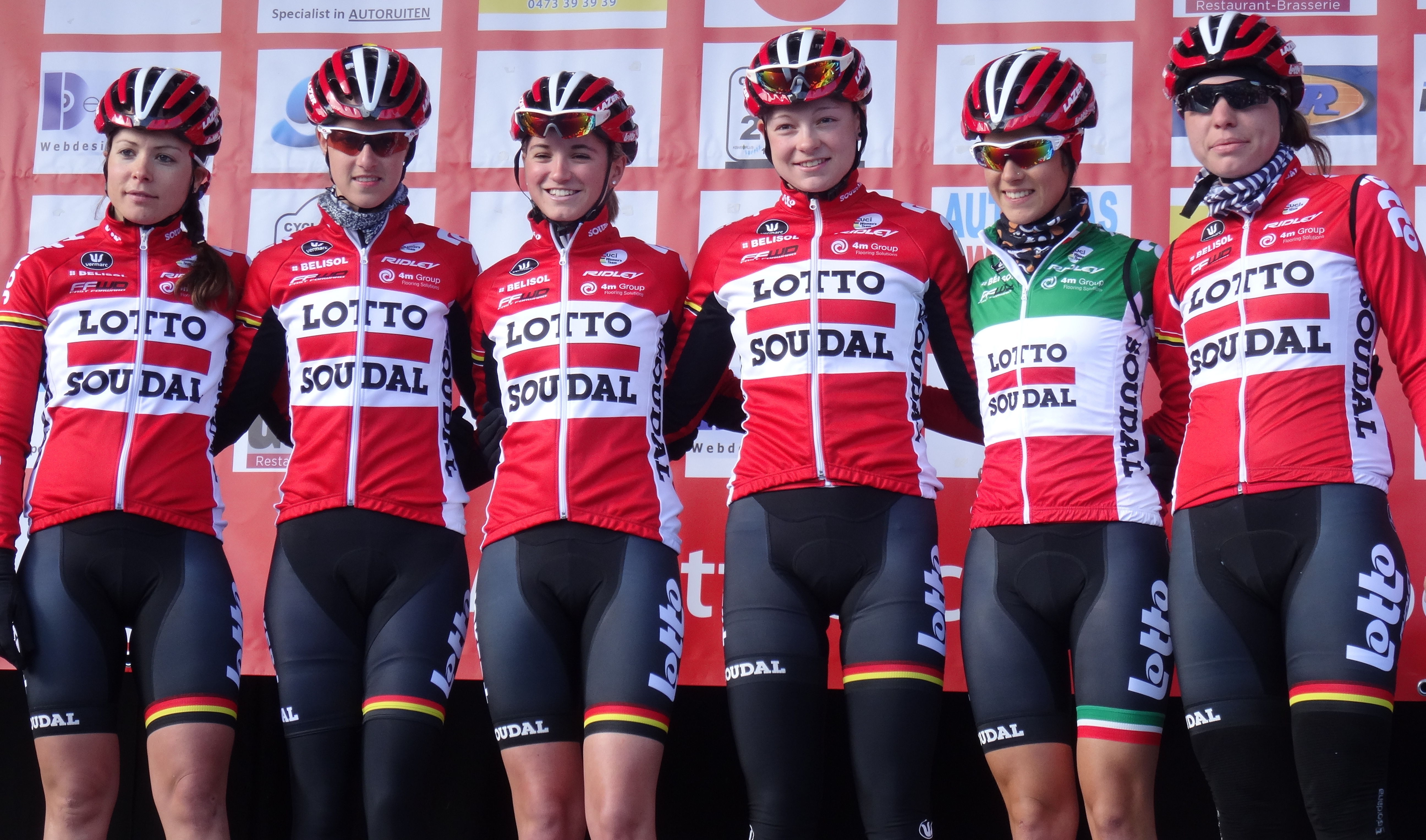 Reportage réalisé le mercredi 4 mars à l'occasion du départ du Samyn des Dames 2015 et du Samyn 2015 à Quaregnon, Belgique.